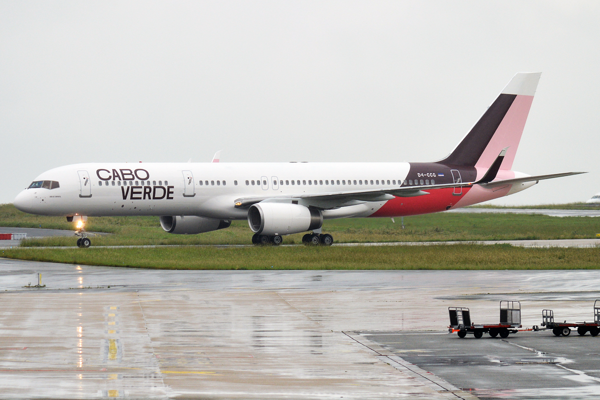 Cabo Verde Airlines, D4-CCG, Boeing 757-208